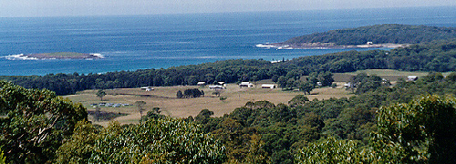 Campus de Kioloa, en Nouvelle-Galles du Sud en Australie